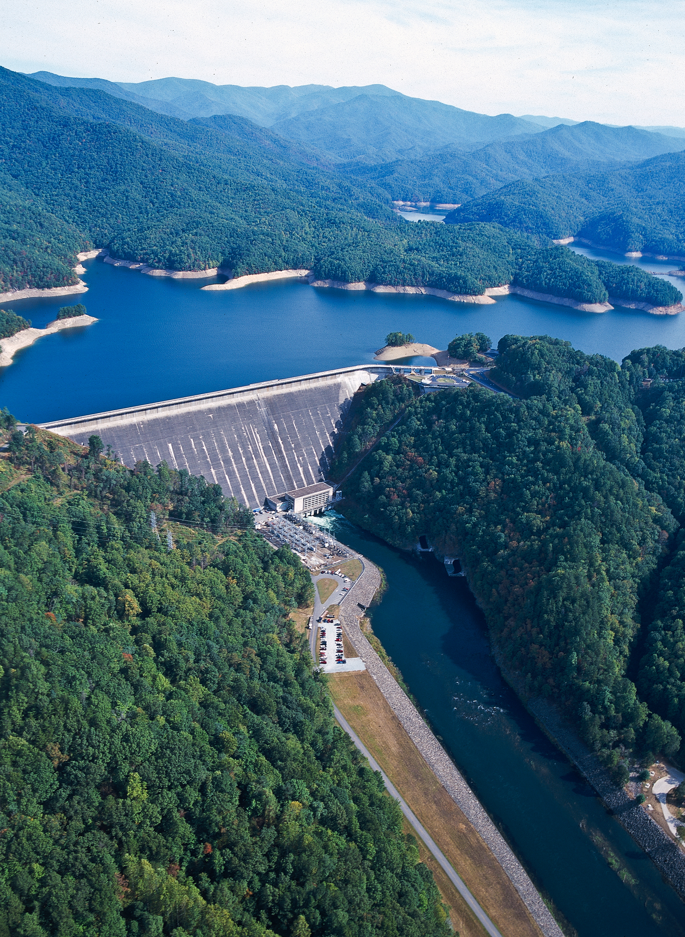 Fontana Dam.